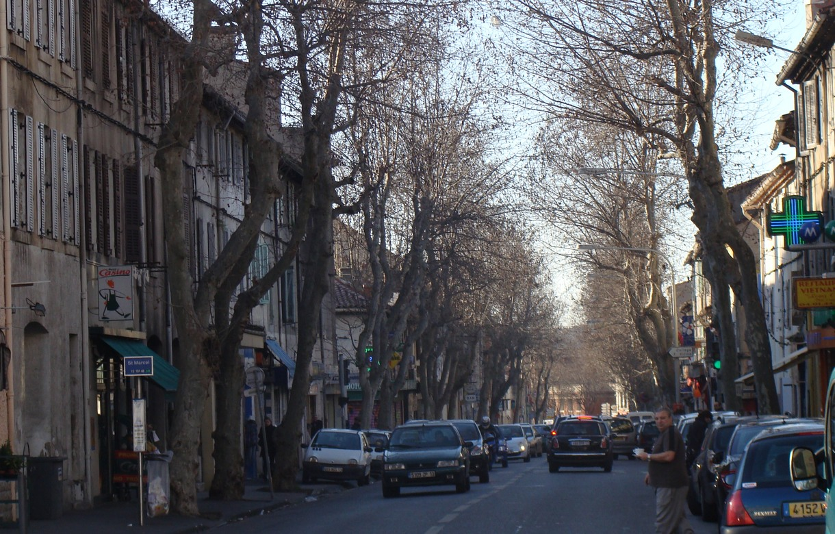 La rue centrale de Saint-Marcel (ex-nationale 8), à Marseille (11e arr.)